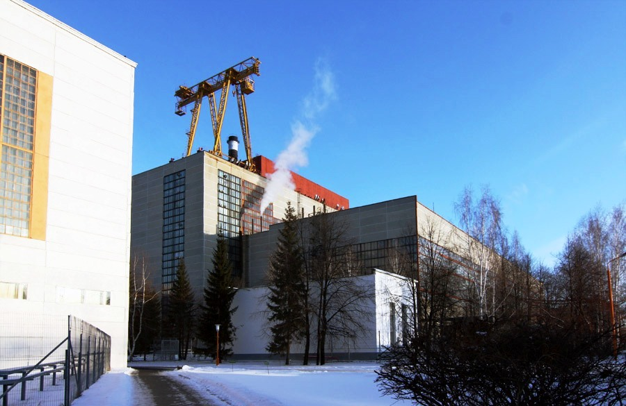 Reaktorblock 3 des Kernkraftwerks Kernkraftwerk Belojarsk.